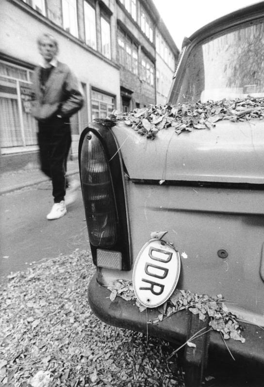 Trabant zur Wendezeit ADN/BER 23.10.90 Erfurt: Bild der Vergänglichkeit. ADN/Ralf Hirschberger [Trabant (Heck mit Laub auf dem Kofferraum) mit hängendem DDR-Nationalitätskennzeichen]